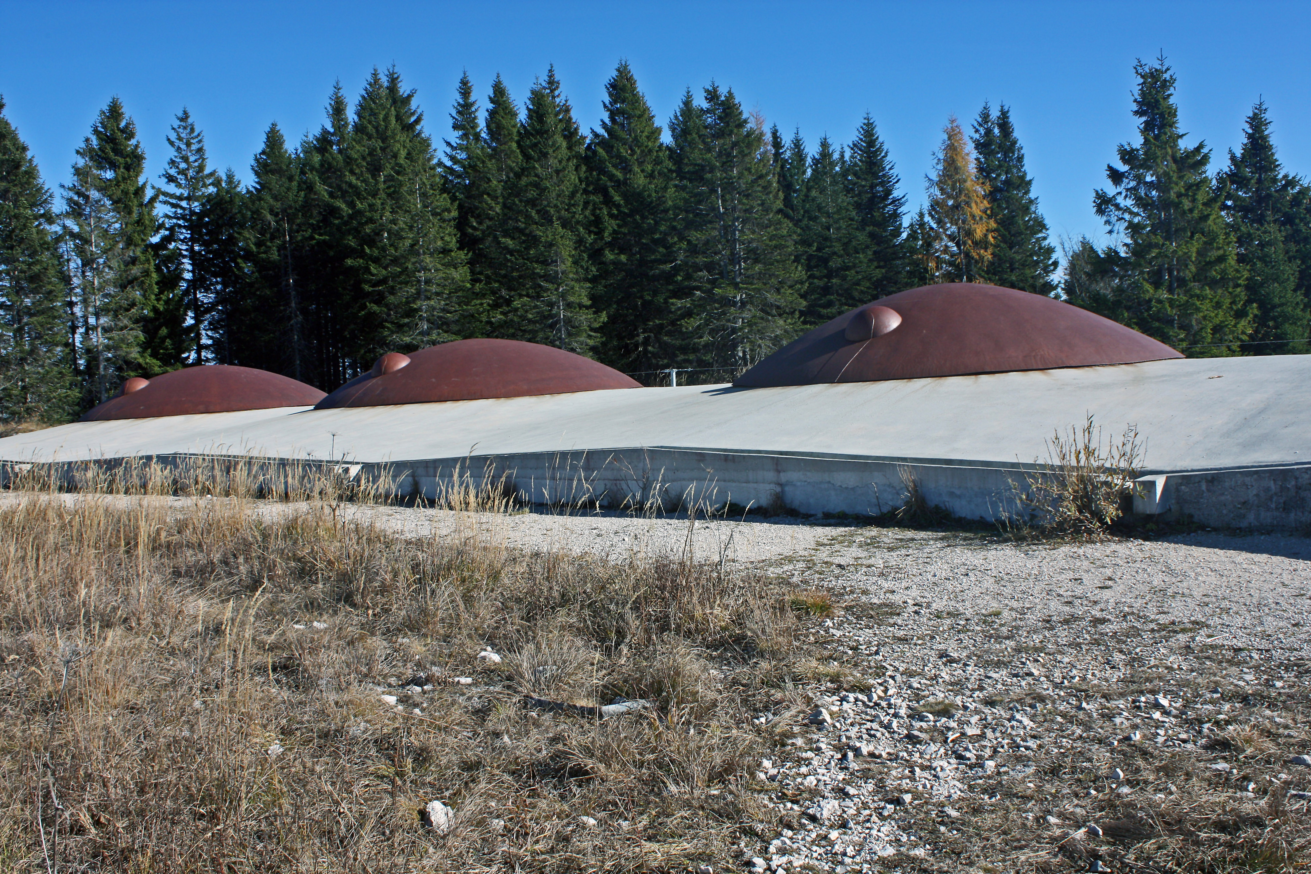 Die Nachbildungen der Panzerkuppeln haben keine Funktion